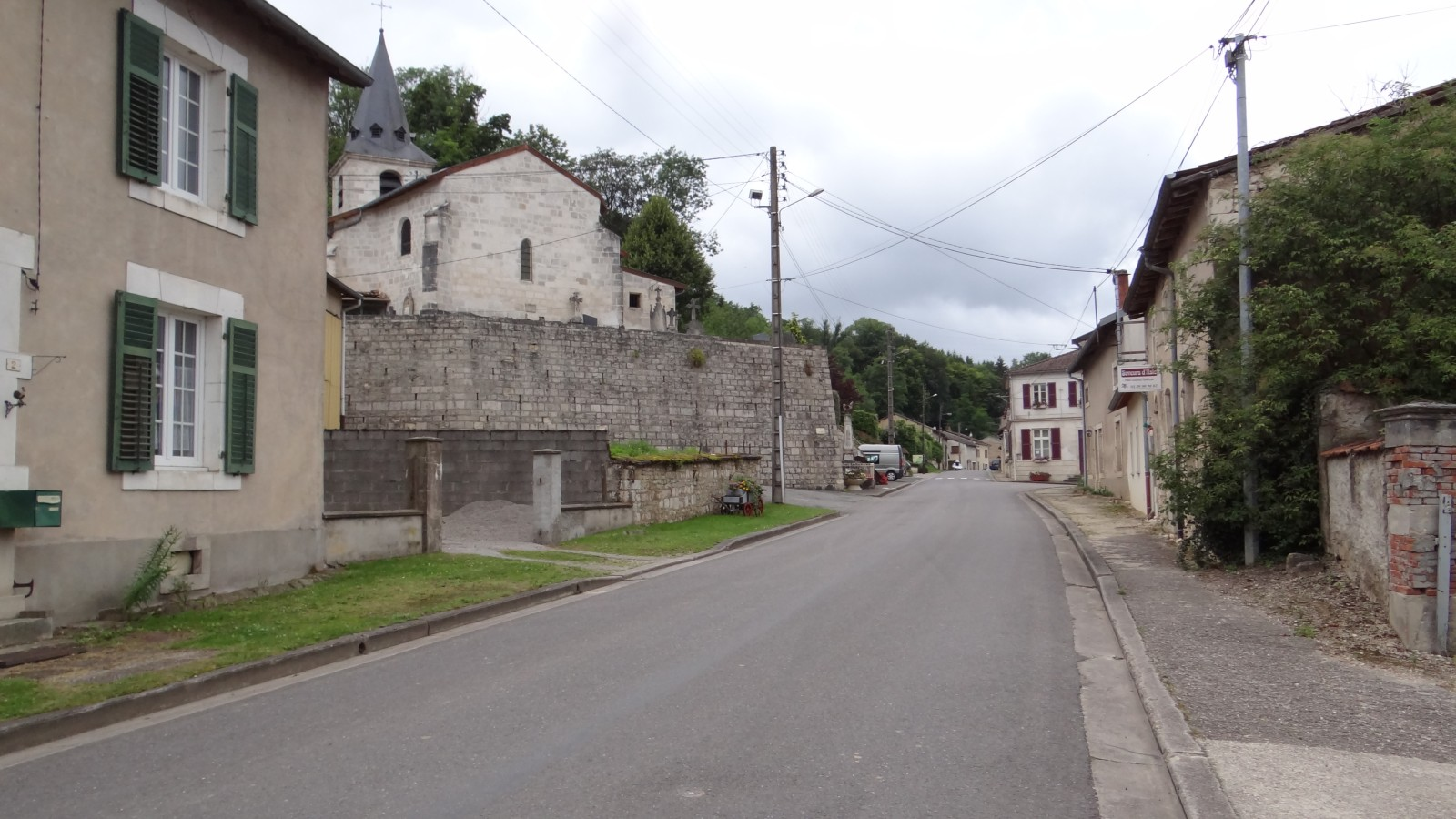 Koeur-la-Grande Rue de l'Orme